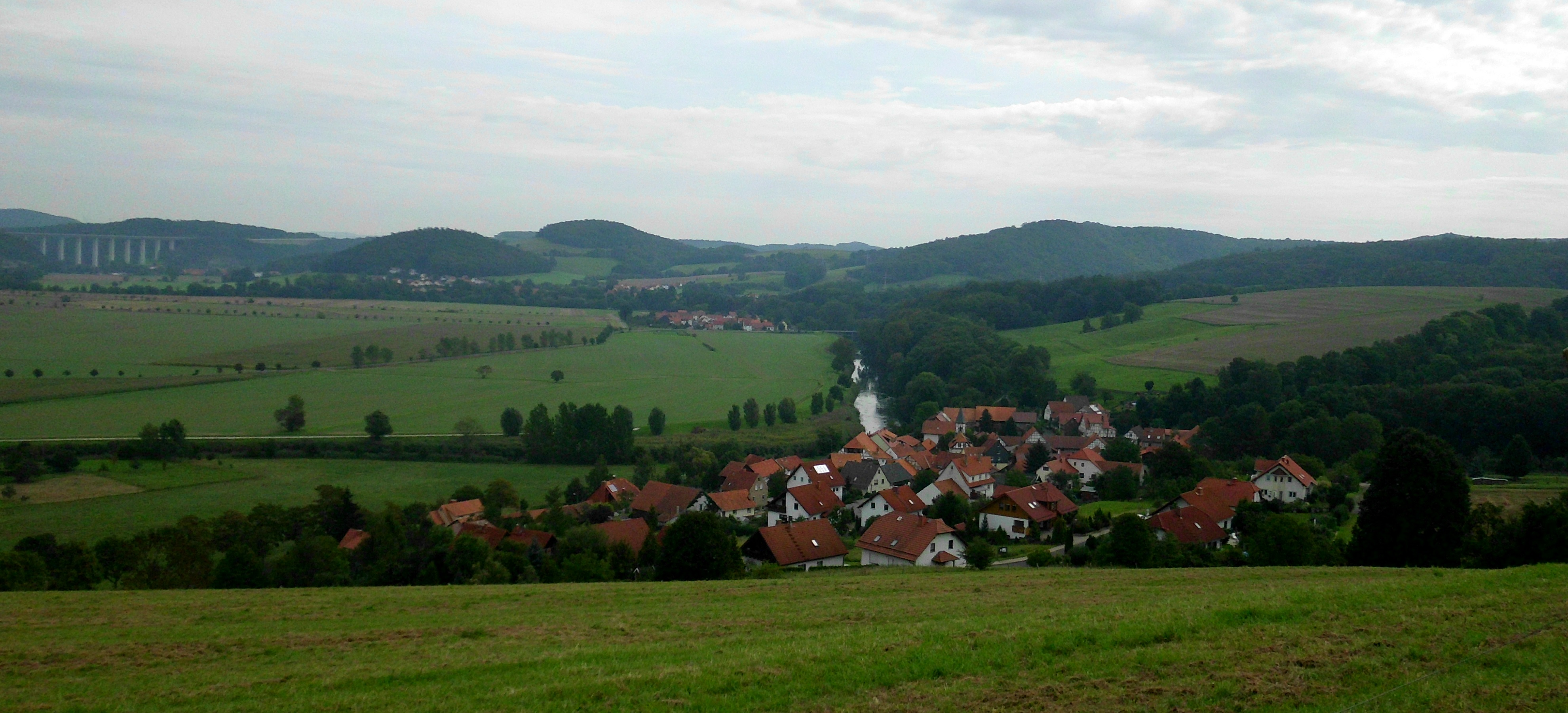 Göringen von Südwesten, dahinter Wartha, Neuenhof und die Autobahnbrücke bei Hörschel